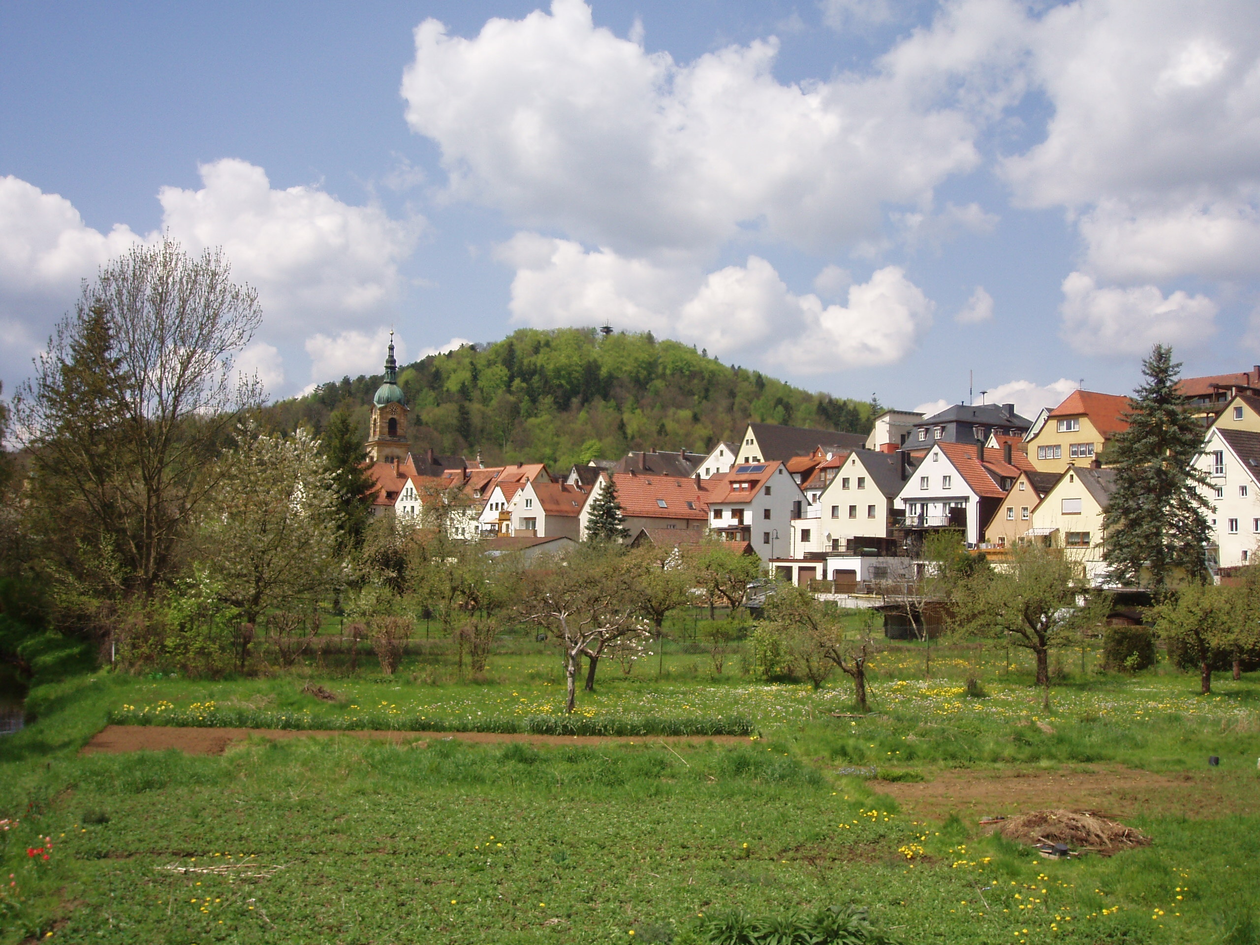 Pegnitz